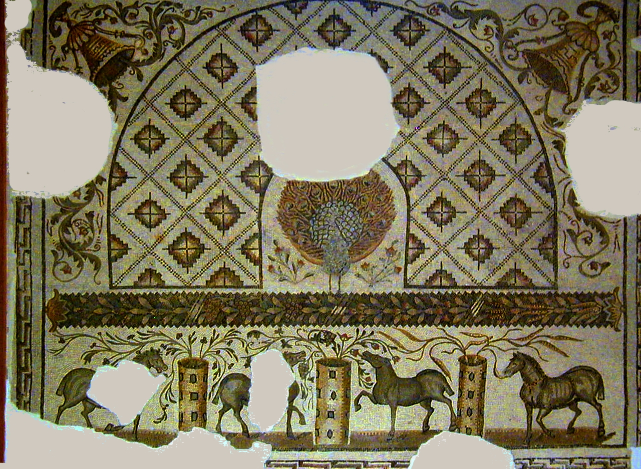 Paon faisant la roue, chevaux des quatre factions du cirque et cylindres de prix, Carthage, IVe siècle. Musée du Bardo, Tunis